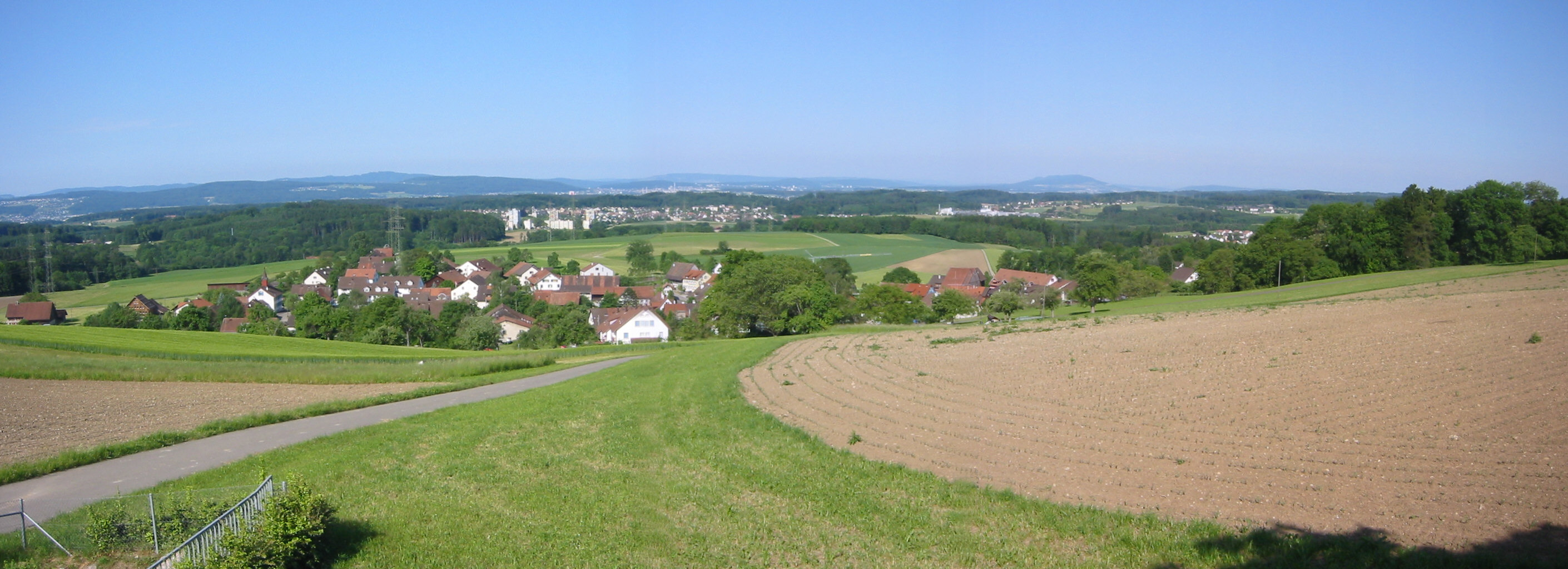 Die Teilfotos wurden von mir am Sonntag dem 29.5.05 von oberhalb Ottikons aufgenommen und am 31.5.05 zu einem Panoramafoto verarbeitet.